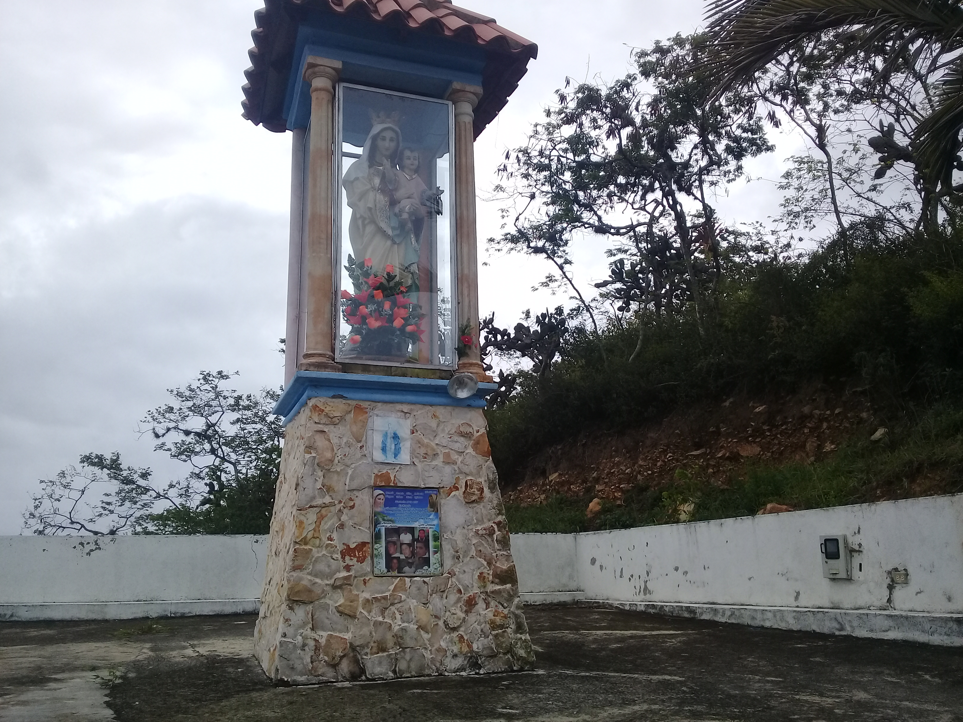 Virgen de la Estacion